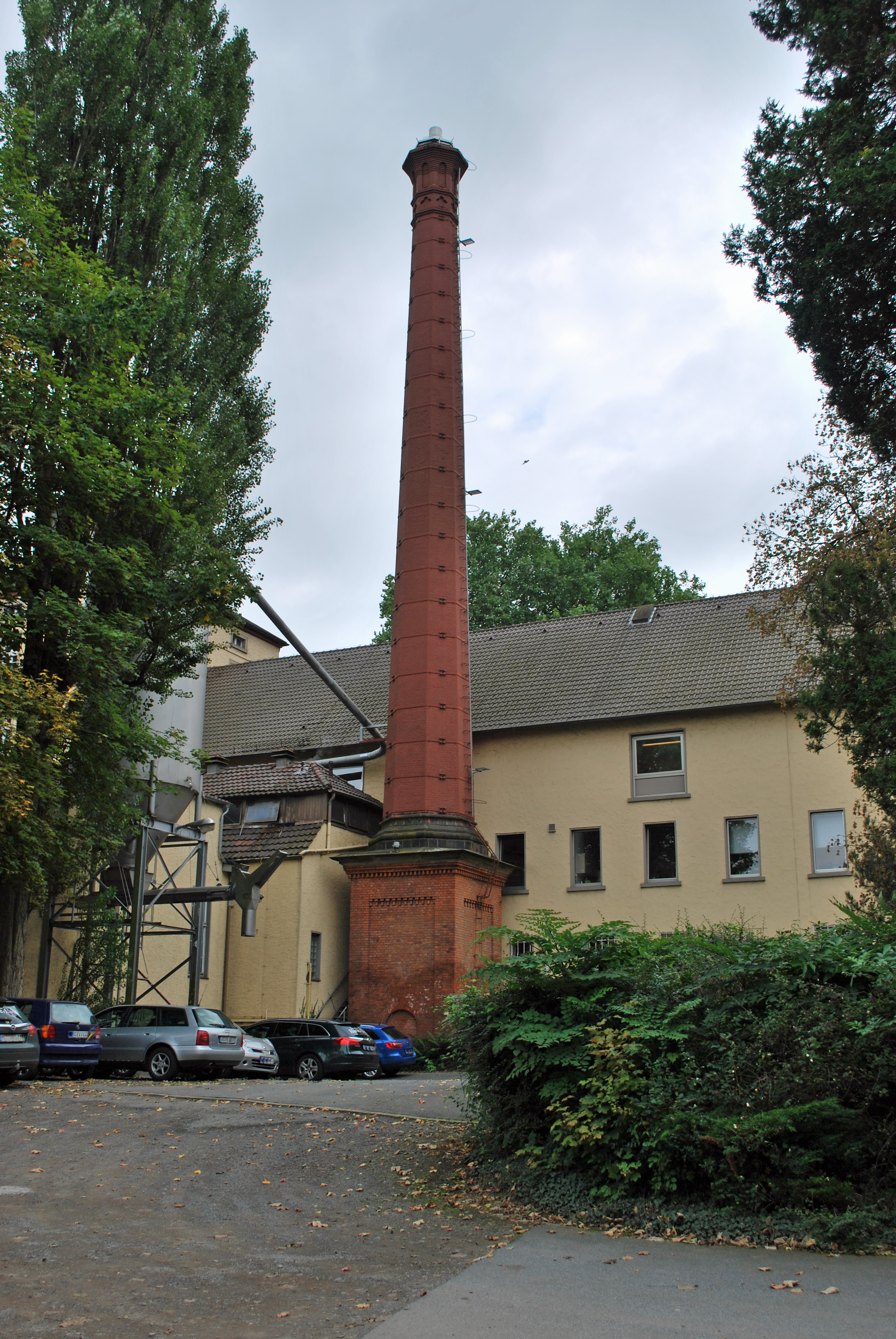 Brauerei Barre, Lübbecke This image shows a heritage building in Germany, located in the North Rhine-Westphalian city Lübbecke (no. 42).